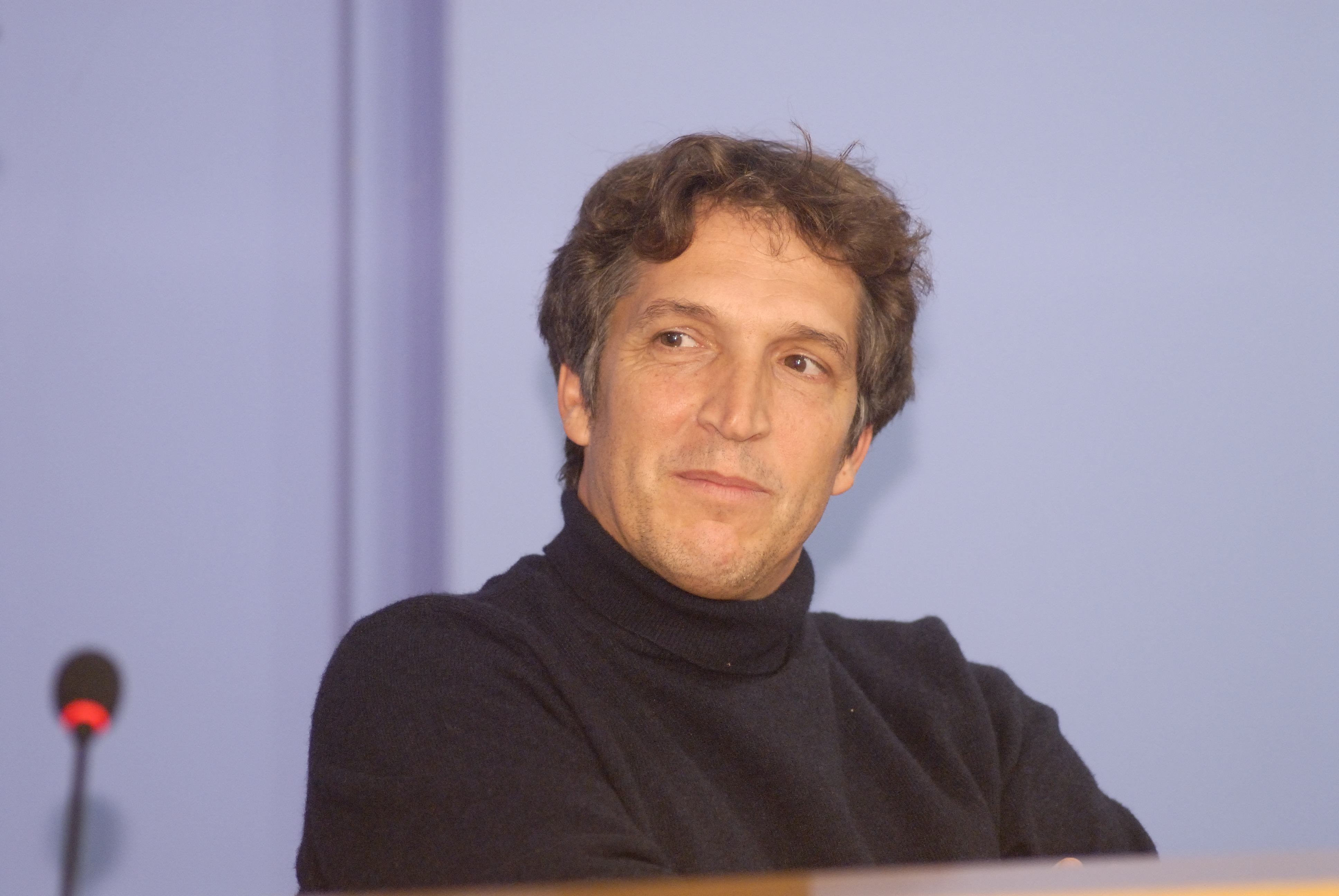 Fotografia de l'Albert Solé i Bruset al MHC el 2008.